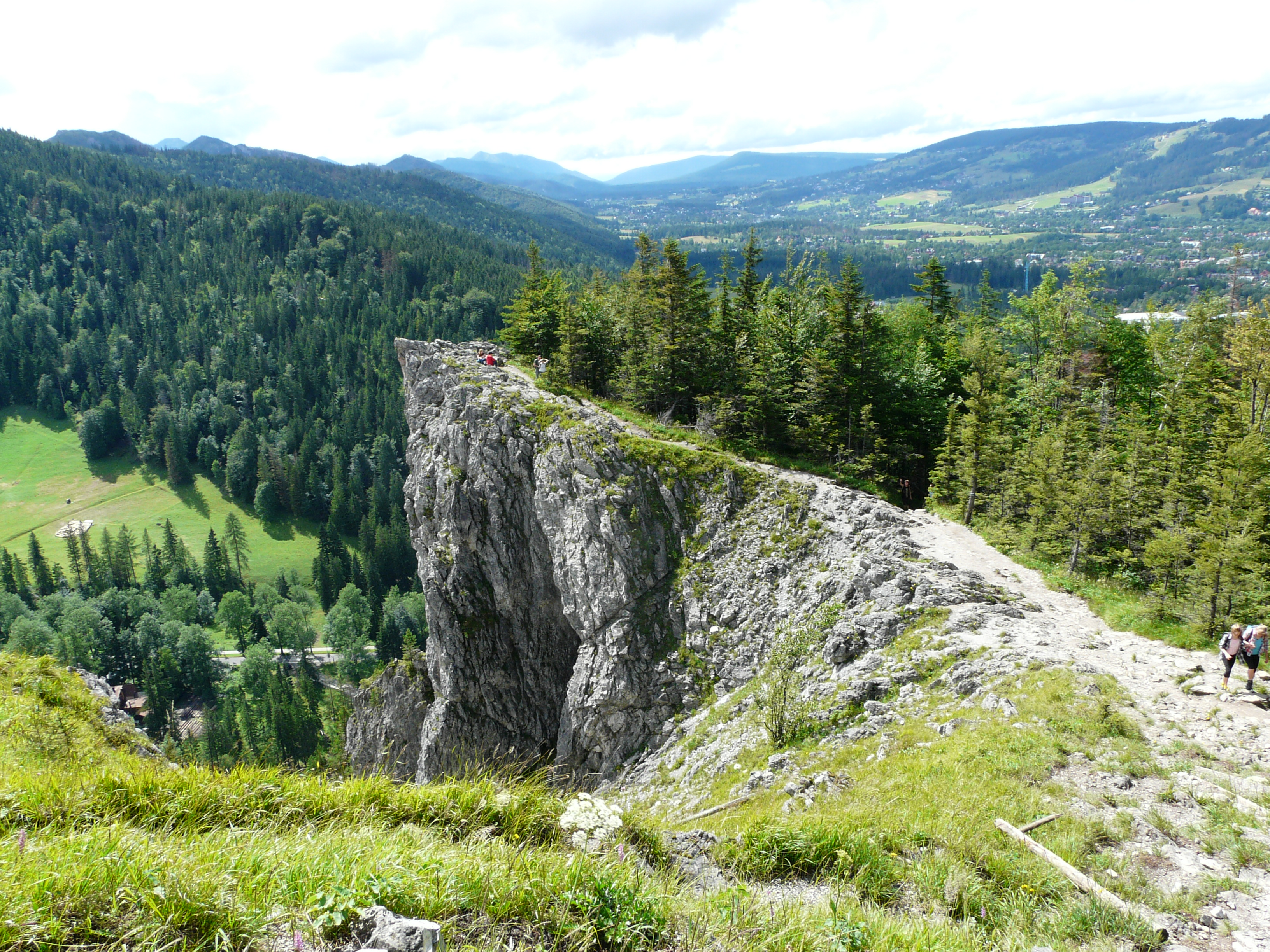 Droga na i widoki z Kużnic na Nosala, Tatry.